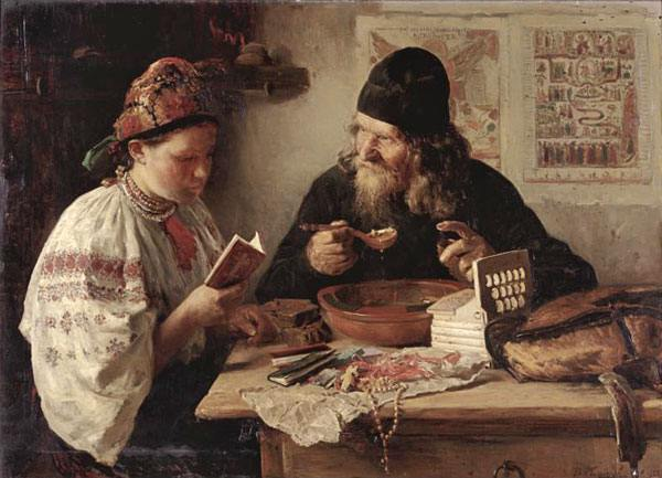 Ukraine